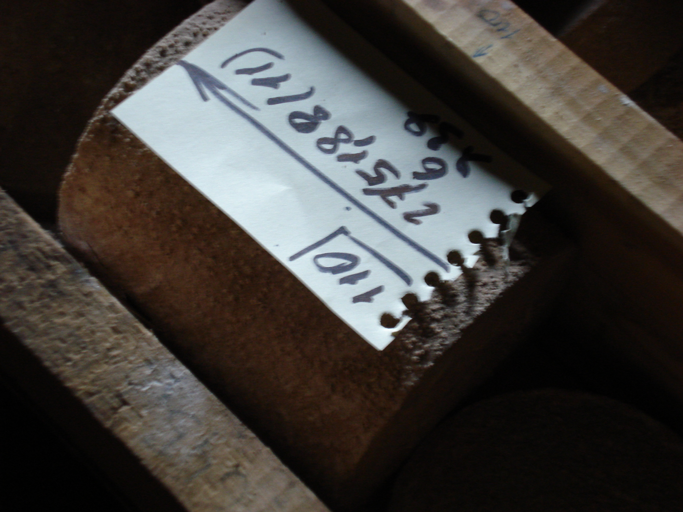 Полноразмерный образец керна с этикеткой, отобранный на исследования